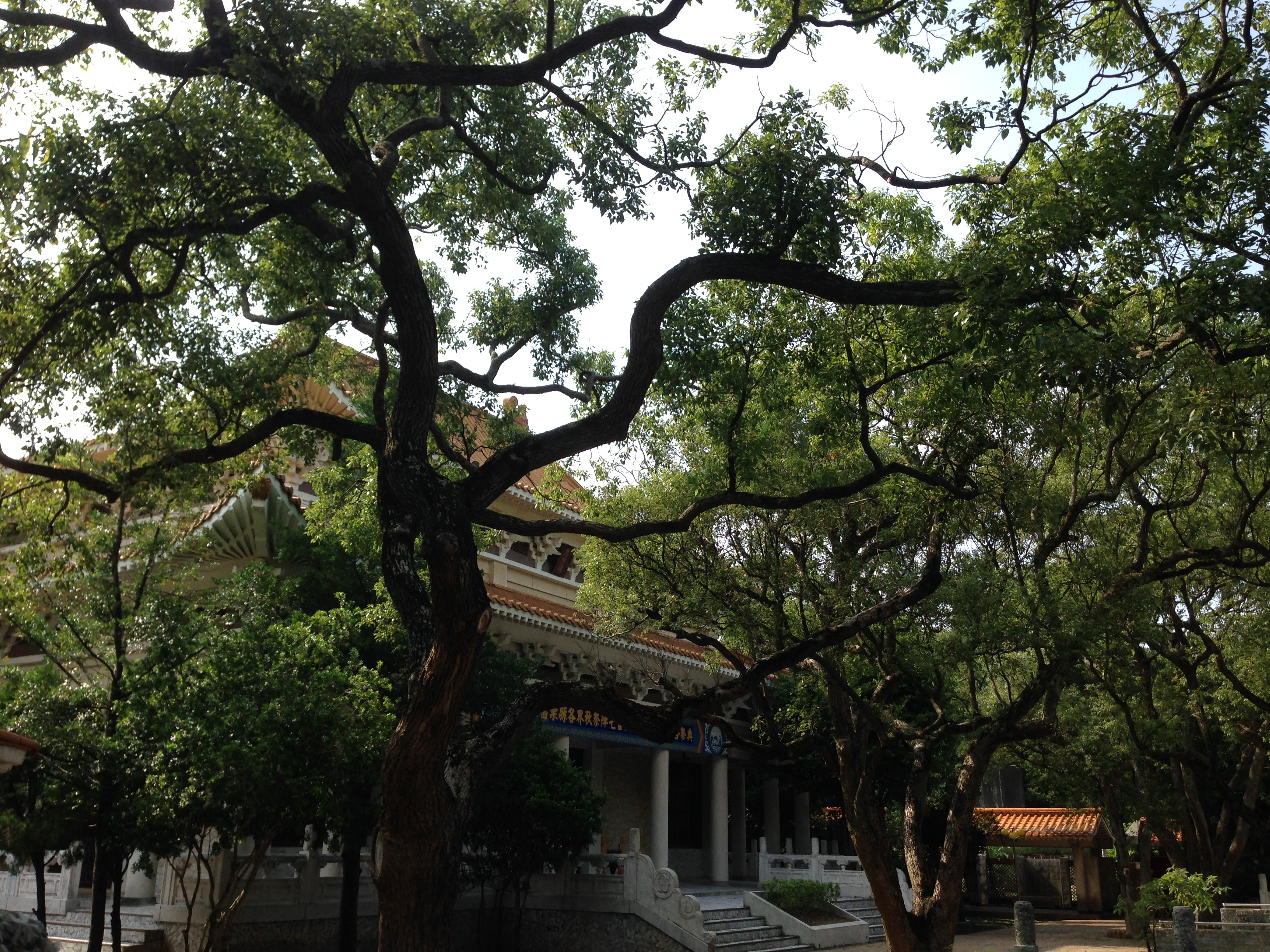 苗栗市貓貍山公園苗栗忠烈祠